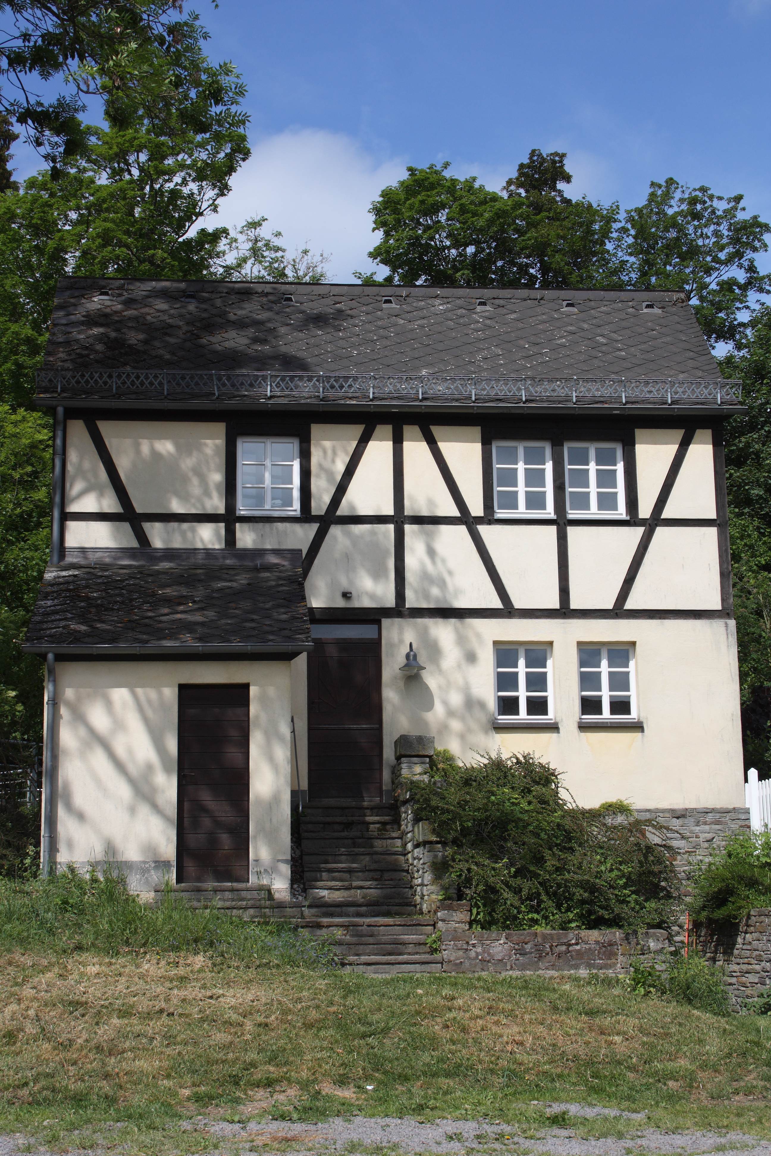 Waldgut Schirmau, ein Hofgut von Anfang des 20. Jahrhunderts, in Schalkenbach, Fachwerkhaus aus dem 18. Jahrhundert, letztes erhaltenes Haus der ehemaligen Siedlung „Hof Schirmau“